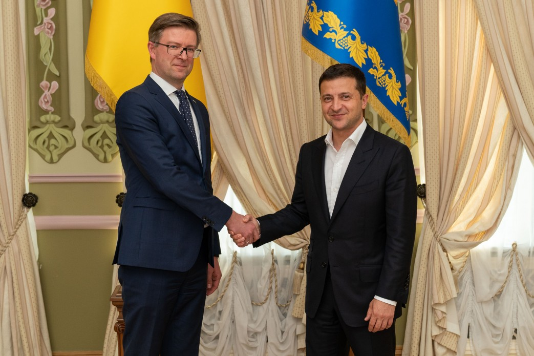 Президент України Володимир Зеленський прийняв вірчі грамоти у послів низки іноземних держав: Естонської Республіки – Каймо Кууска